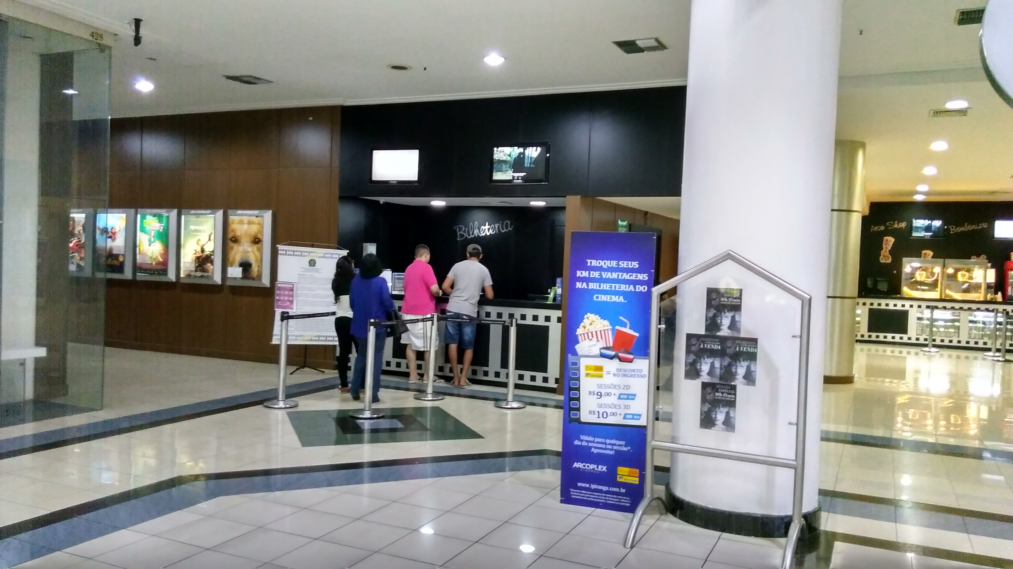 Foyer do Arcoplex Aldeota